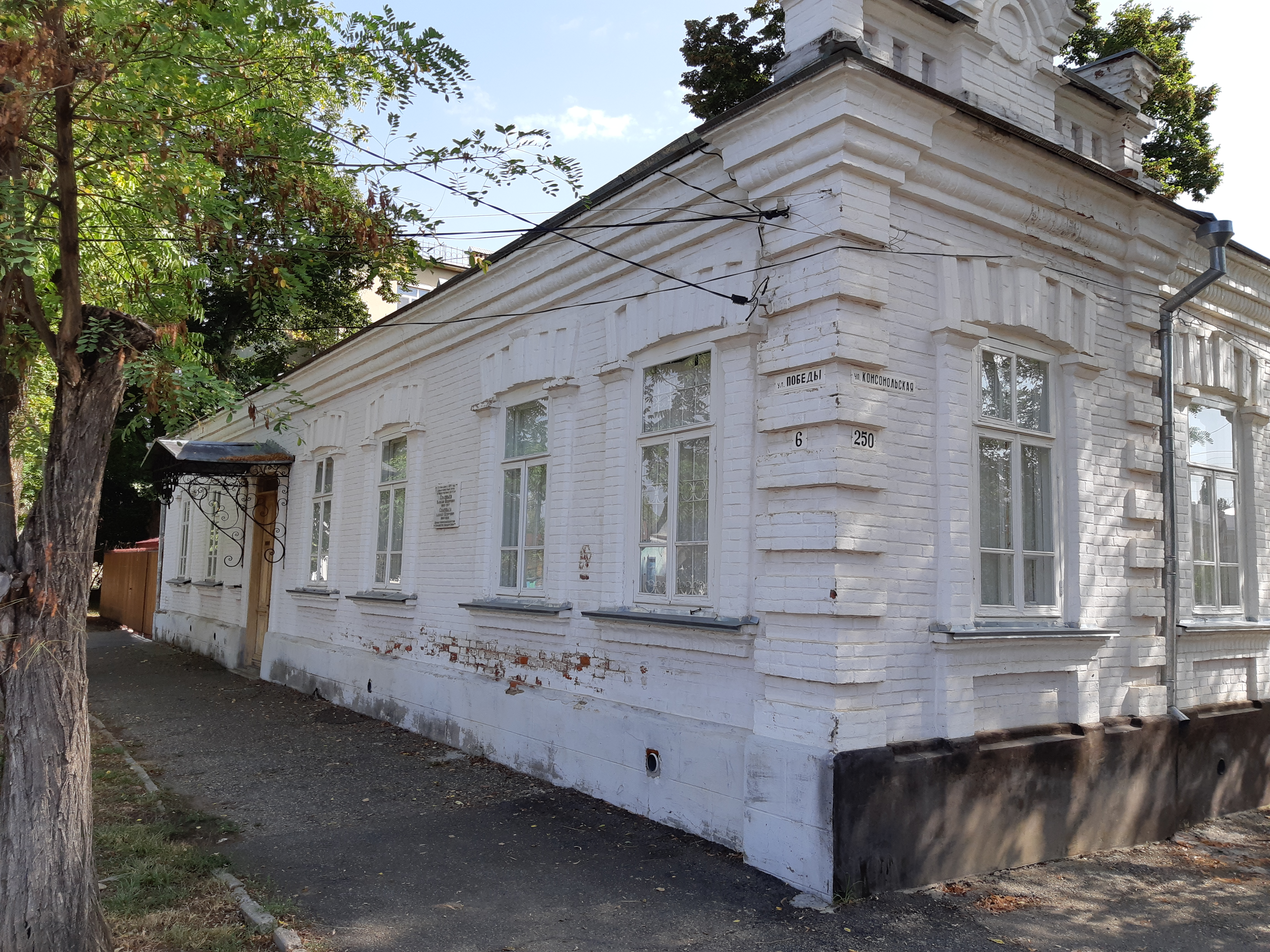 Дом, в котором в разные годы жили революционеры А.Ф.и В.Ф. Соловьевы, военный деятель И.И. Петрожицкий и бывали революционеры А.А. Жулковский, И.П. Покровский, Л.Ф. Герус: улица Победы, 6, Майкоп, Адыгея